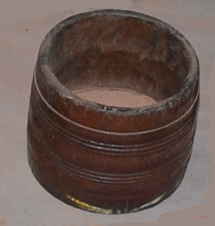 പഴയ കാലത്ത് ഉപയോഗിച്ചിരുന്ന നാഴി എന്ന അളവു പാത്രം